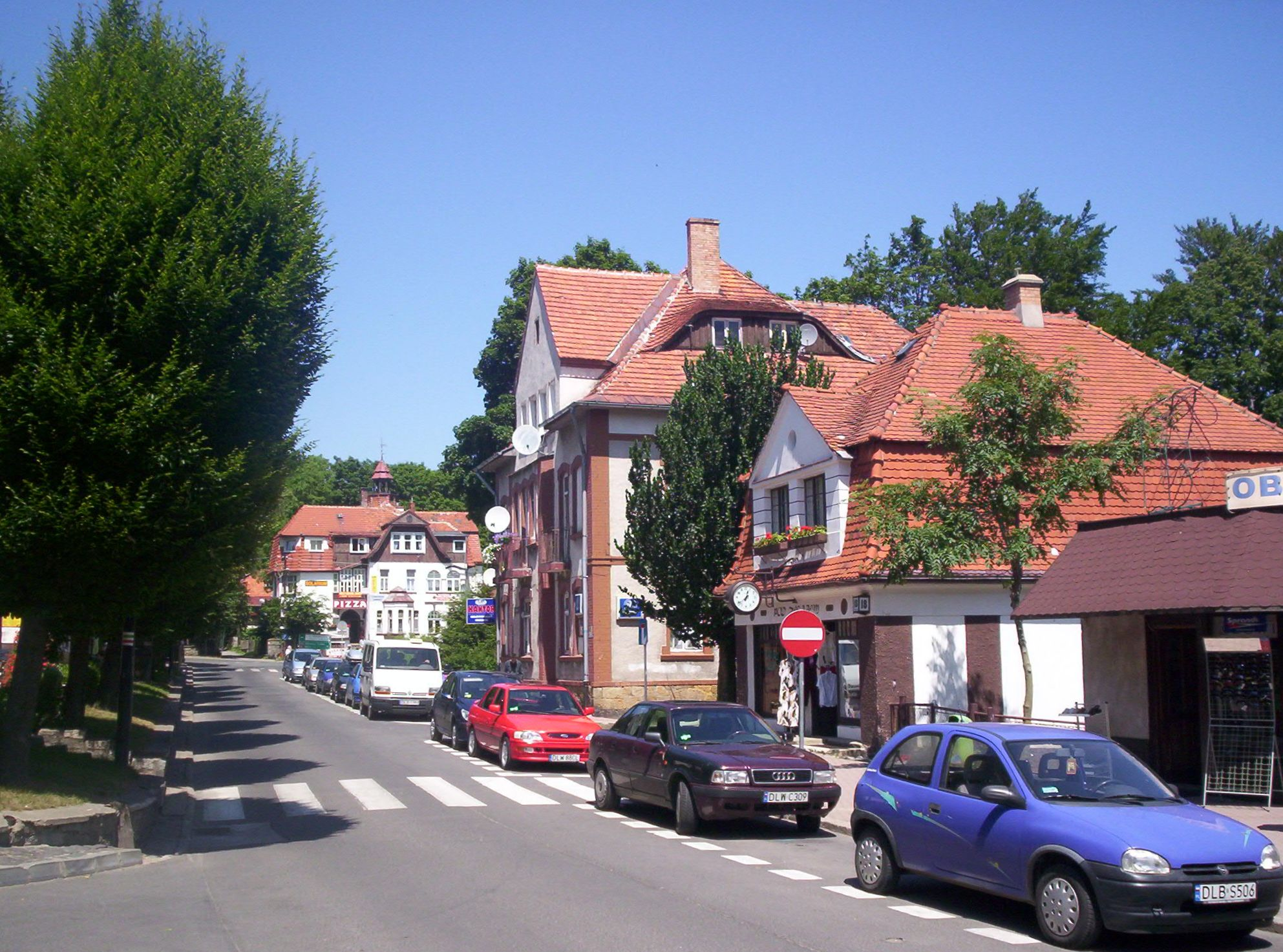 Ulica Zdrojowa w Świeradowie-Zdrój